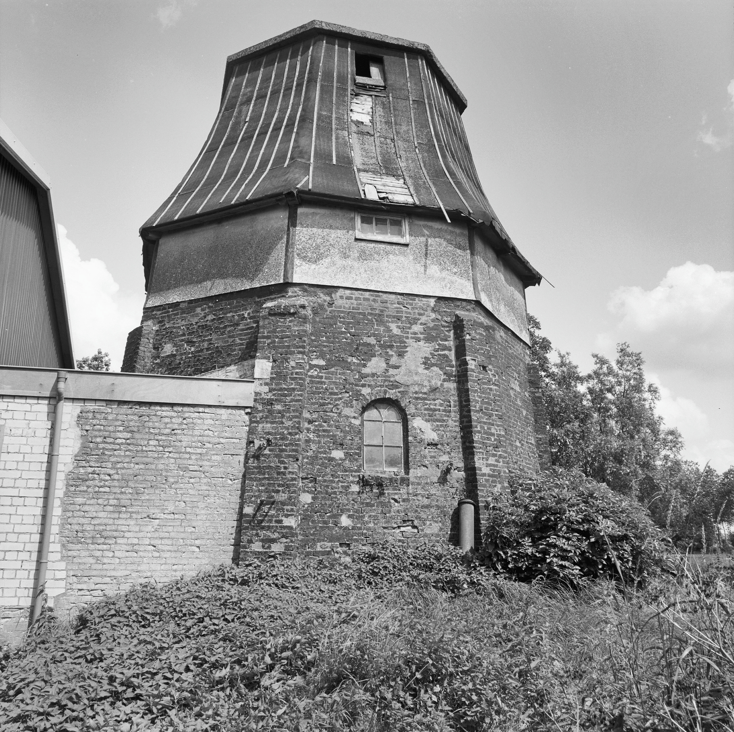 Woonhuizen Diversen: korenmolen, romp